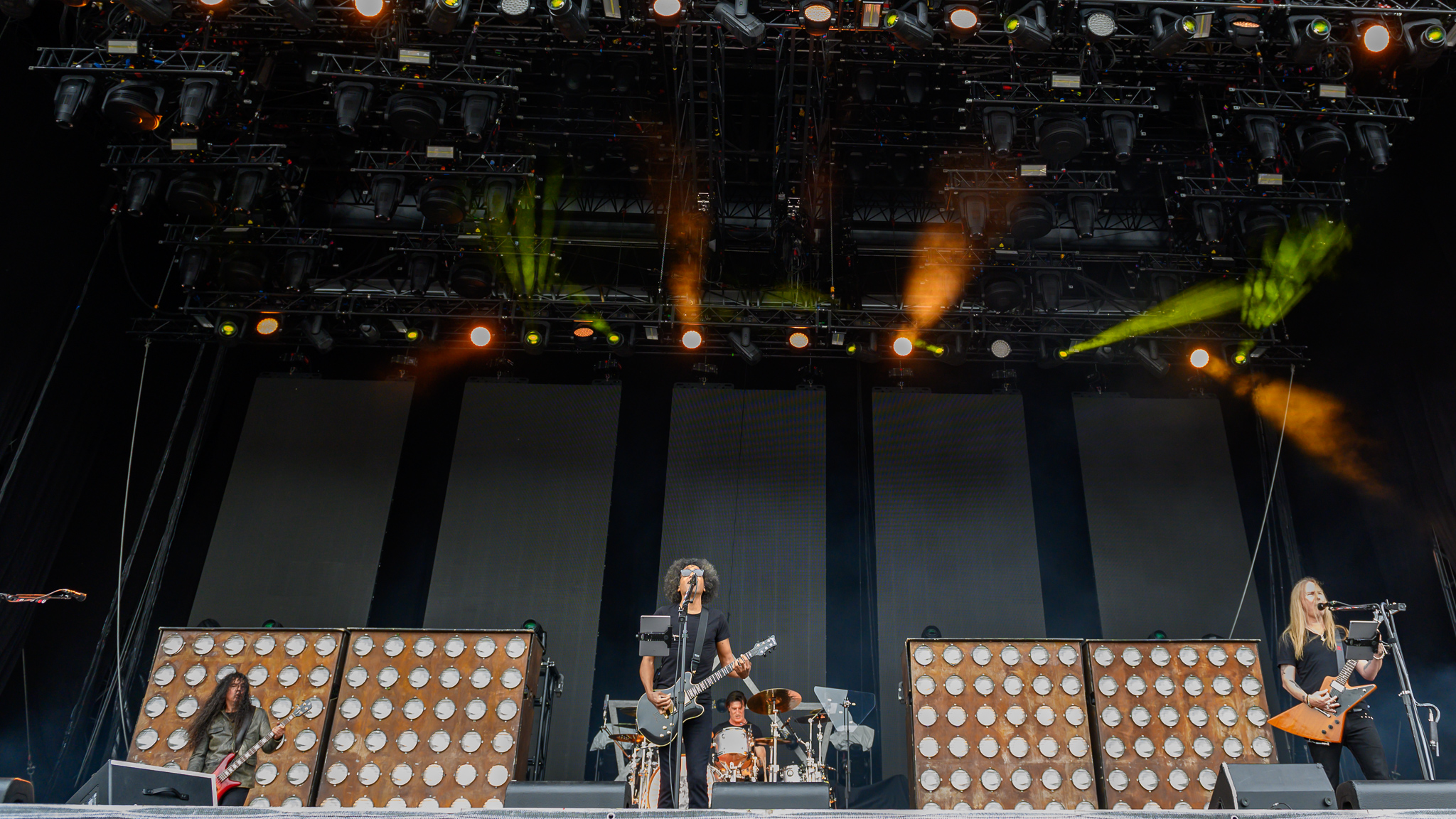 ARGO-Konzerte,Alice in Chains,Jerry Cantrell,Konzert,Livekonzert,Livemusik,Mike Inez,Musik,RiP,Rock im Park 2019,Sean Kinney,William DuVall,Zeppelin Stage